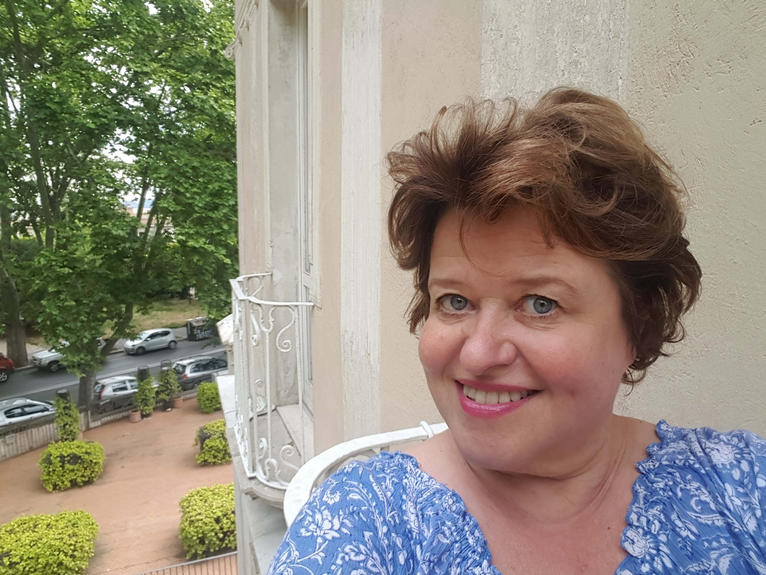 författare